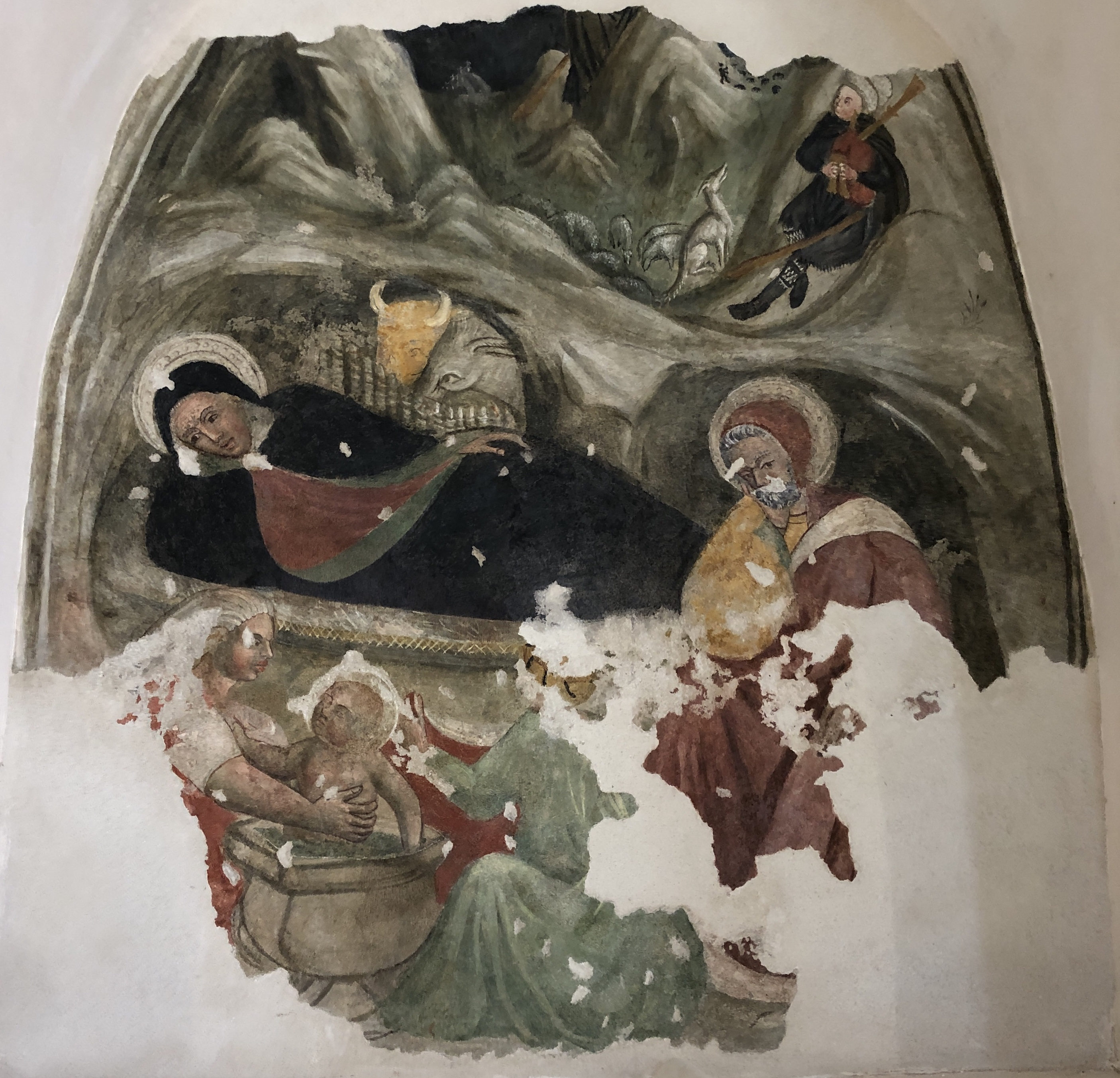 Affresco in una della nicchie nella chiesa di San Silvestro in L'Aquila